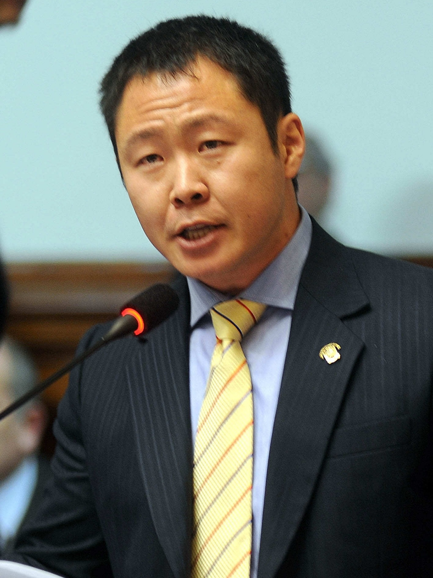 El congresista Kenji Fujimori durante su intervención en el debate parlamentario realizado esta mañana por el Pleno congresal.